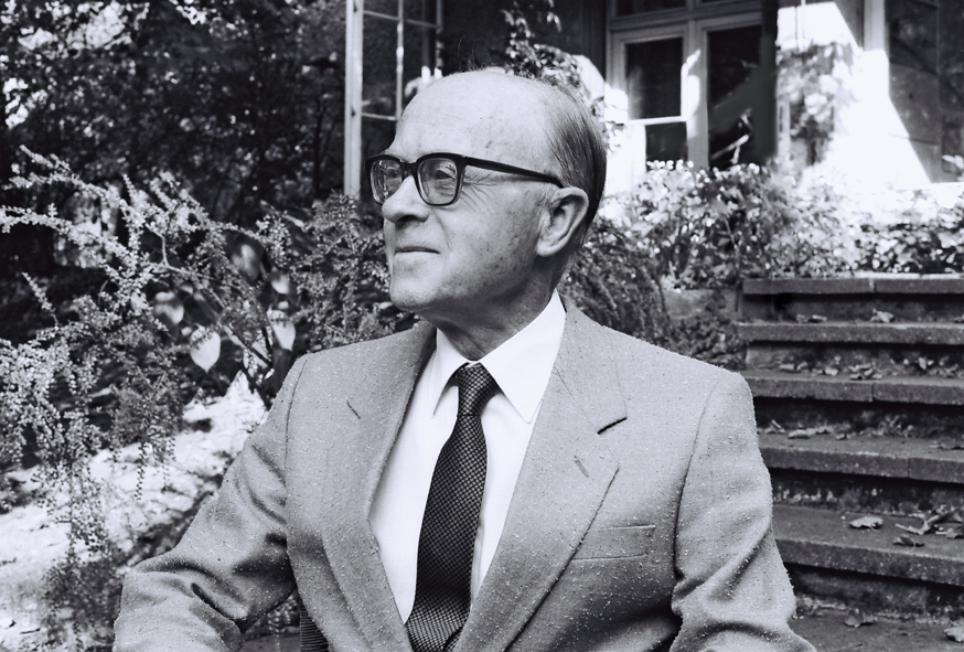 Portrait du Prof. Dr. Marcel Monnier, réalisé à Riehen (Bâle, Suisse) en novembre 1985, par Nicolas Monnier (Nimolas)